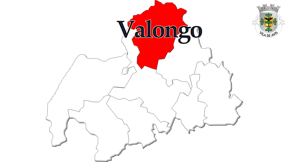 Evolução da População